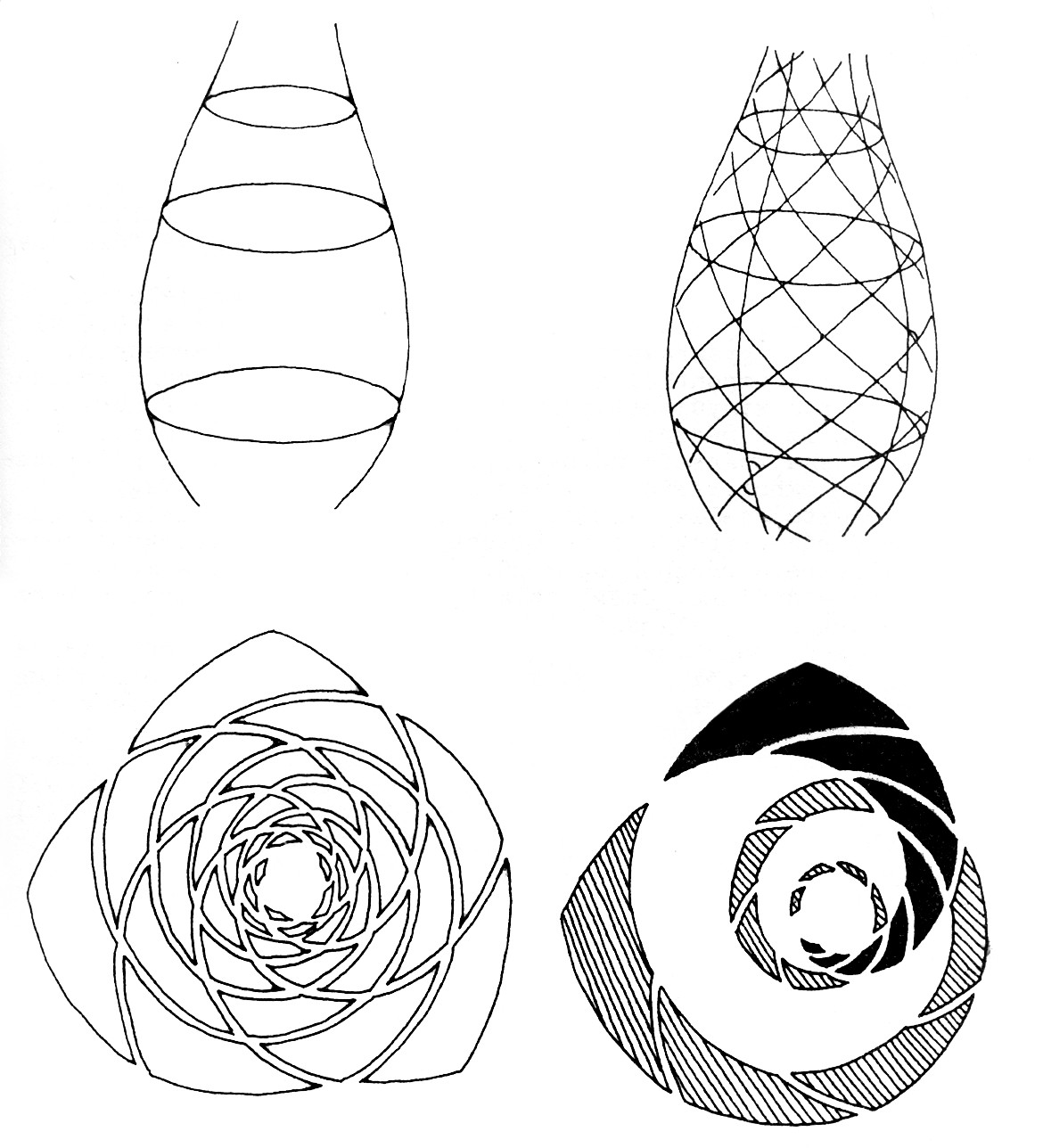 Transzformációk Fibonacci-növényeken